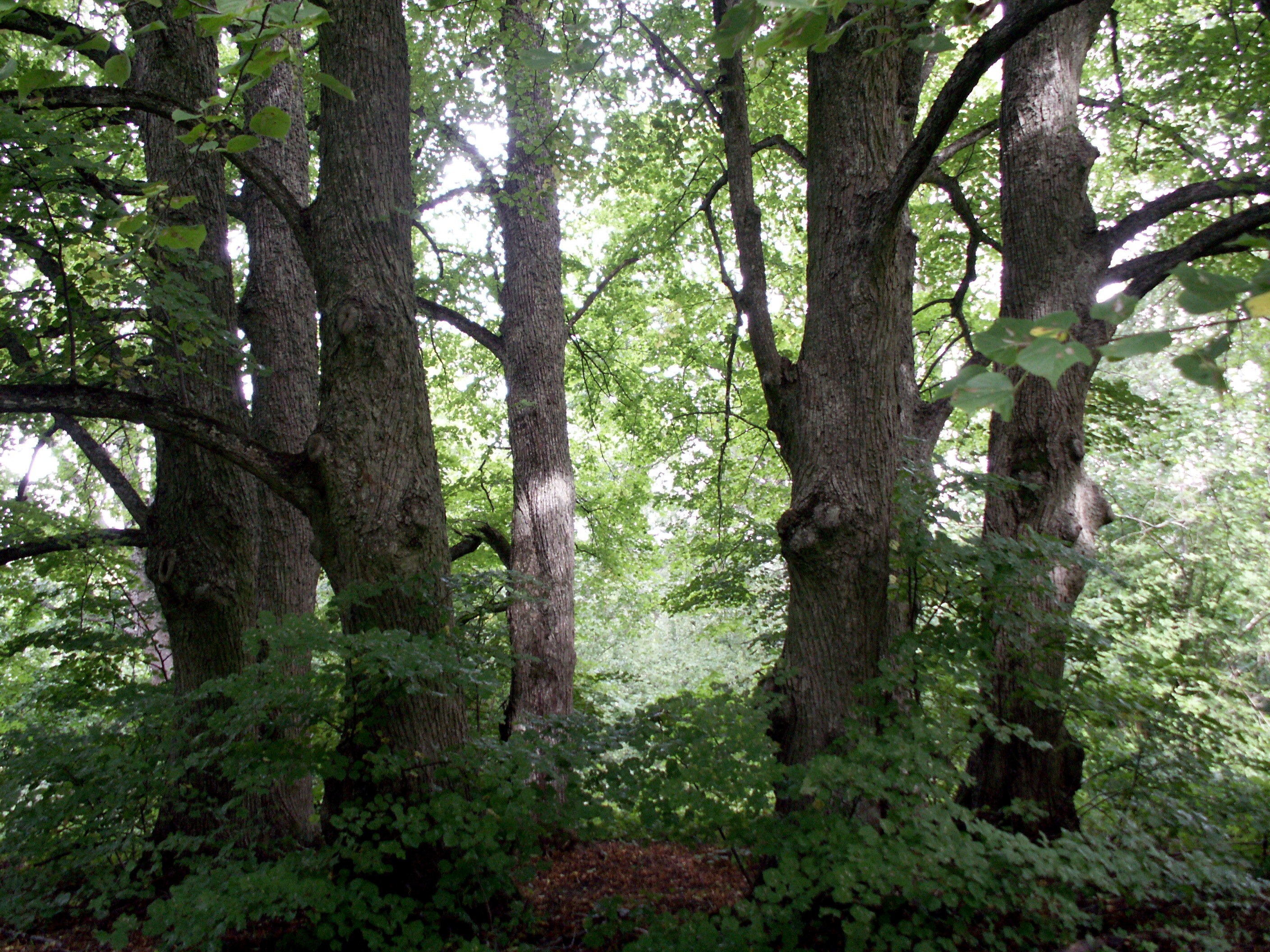 Medžių rotonda Šventkalnyje, Tervetė, Tervetės pagastas, Latvija